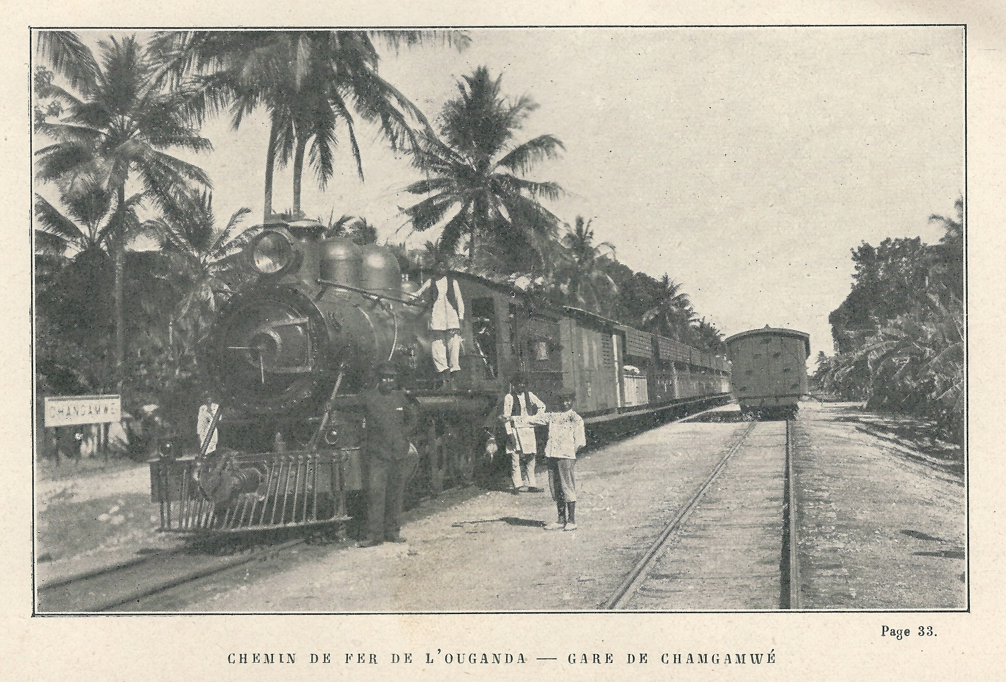 Illustration de l'ouvrage : Jules Leclercq , Aux sources du Nil par le chemin de fer de l'Ouganda, 1913